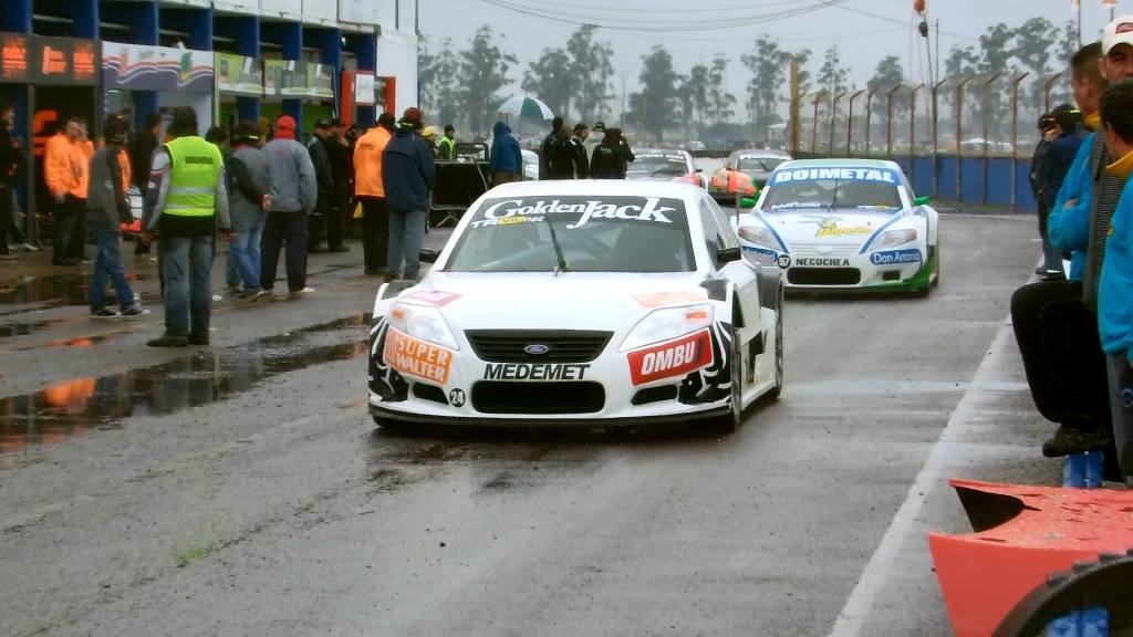 Fotografía del piloto Facundo Ardusso, al comando de su Ford Mondeo III de la categoría Top Race V6, en el año 2013, durante la competencia realizada en Resistencia Chaco. Lo persigue Juan Bautista De Benedictis.